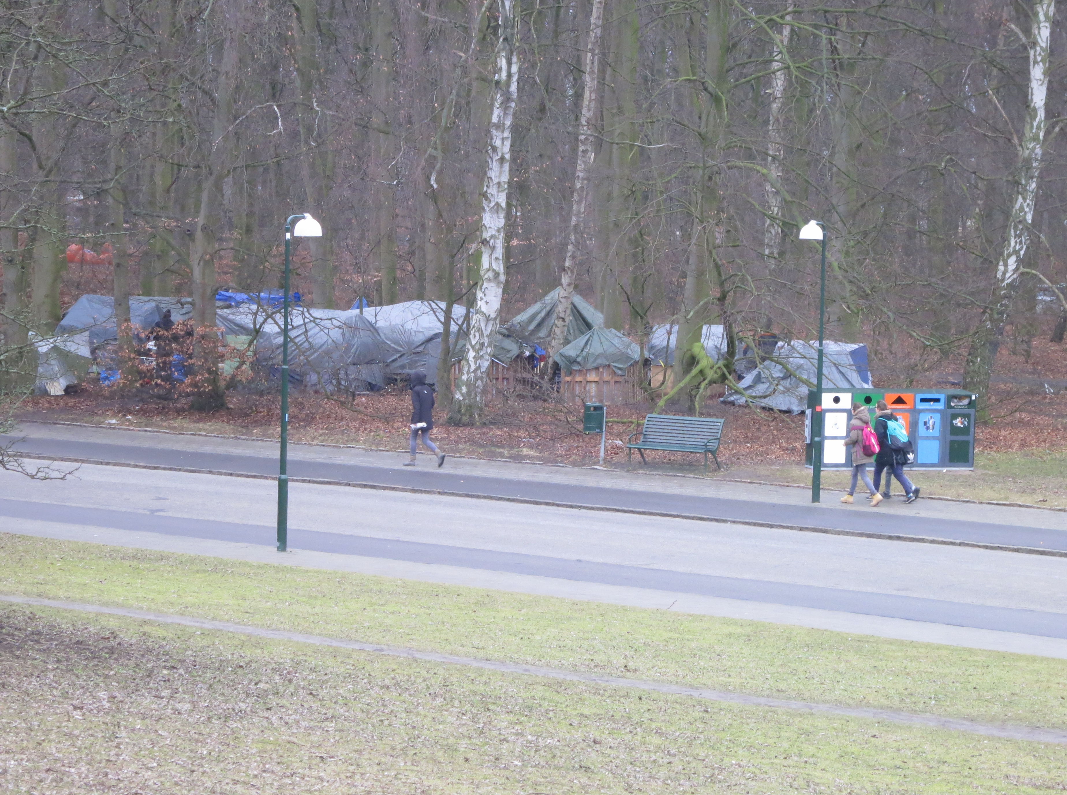 Tältläger med EU-migranter i Pildammsparken i Malmö